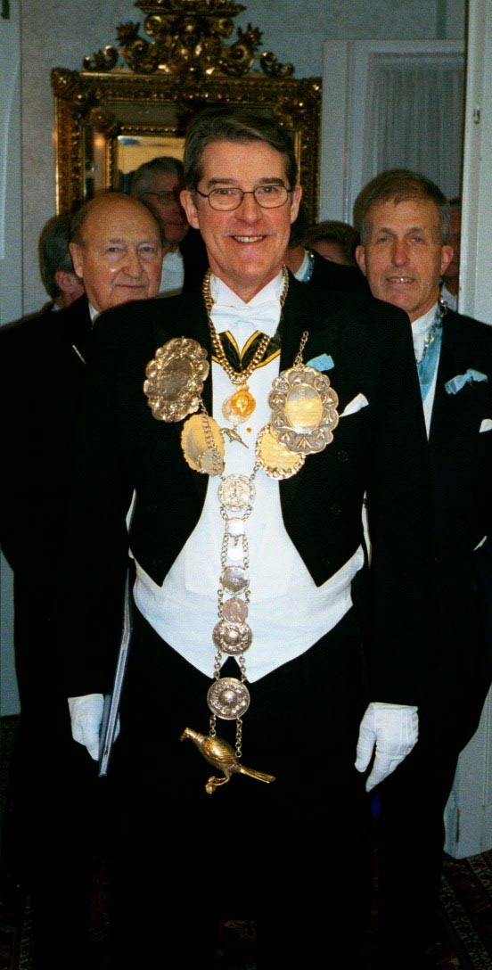 Domprost emeritus Anders Svenningsen i sin roll som ålderman för Sankt Knuts Gille i Lund.